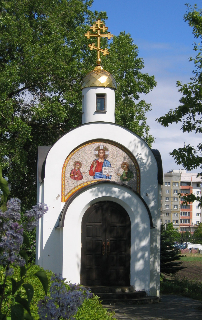 Часовня в честь Святого Духа